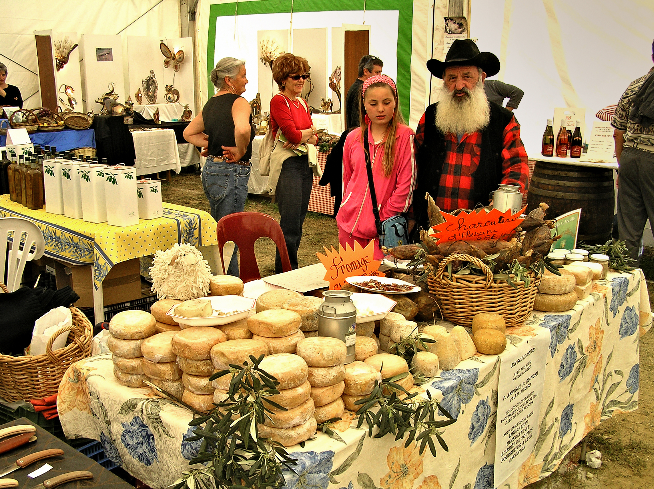 Venaco - Foire du fromage 2005